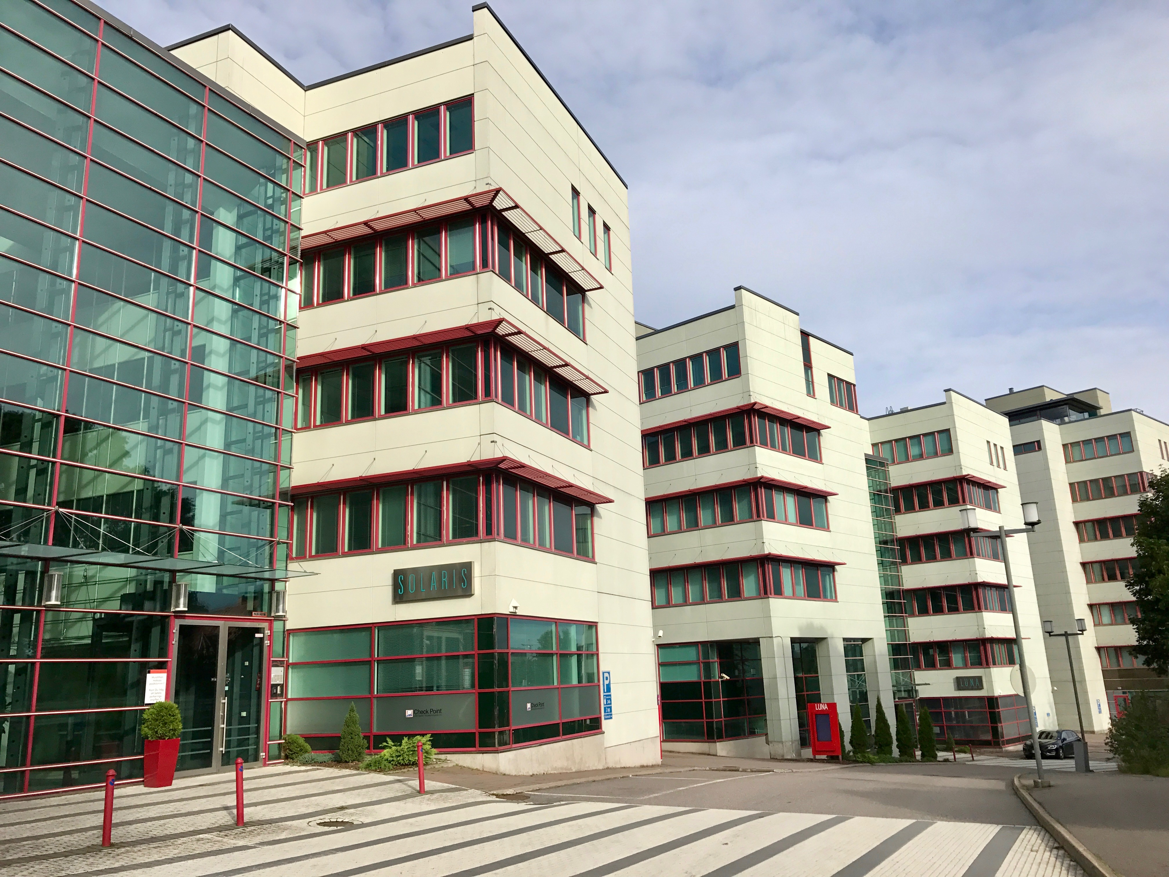 Stella Business Park yrityspuiston rakennuksia Espoon Leppävaarassa, osoitteessa Lars Sonckin kaari 10-16.